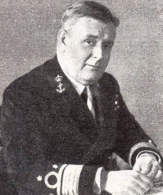 Johannes Theodorus Furstner